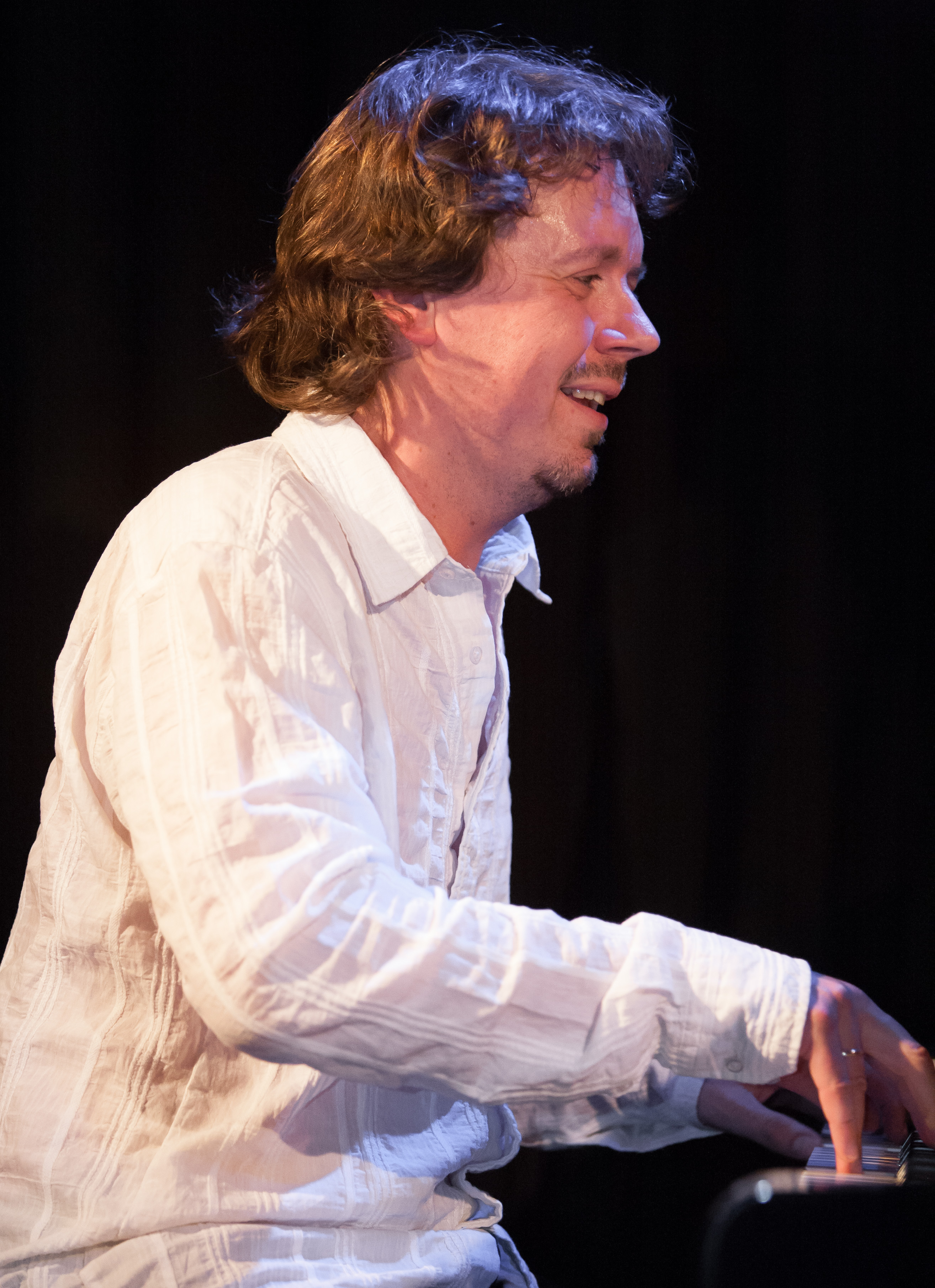 Marcus Schinkel in der Harmonie (Bonn)